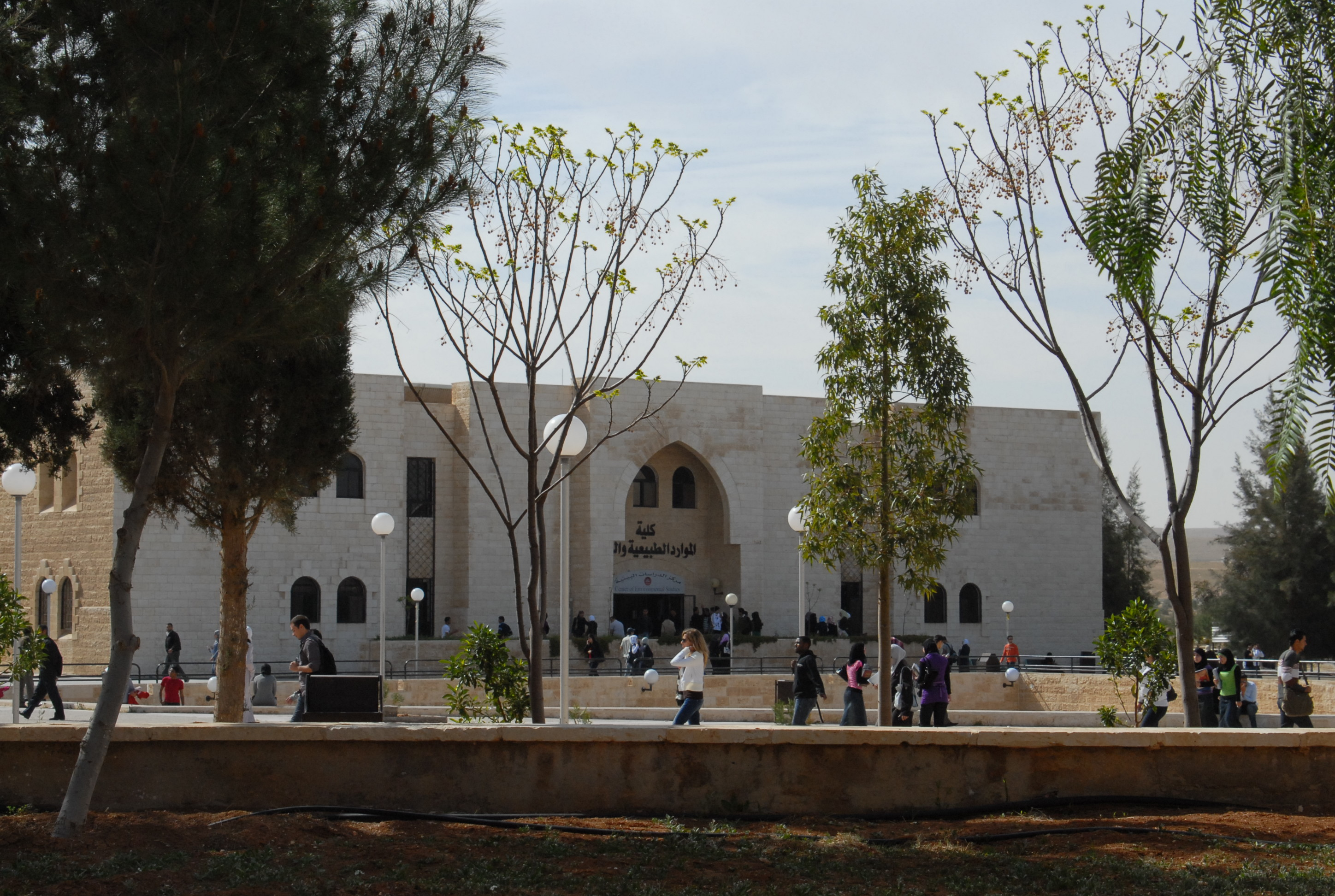 صور للجامعة